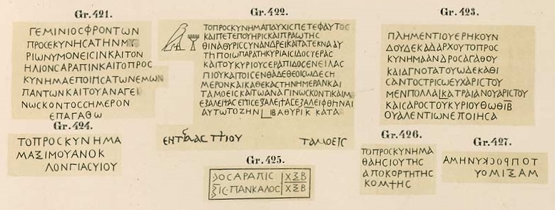 Abzeichnung einer griechischen Inschrift am Tempel von Maharraka in Unternubien, Ägypten